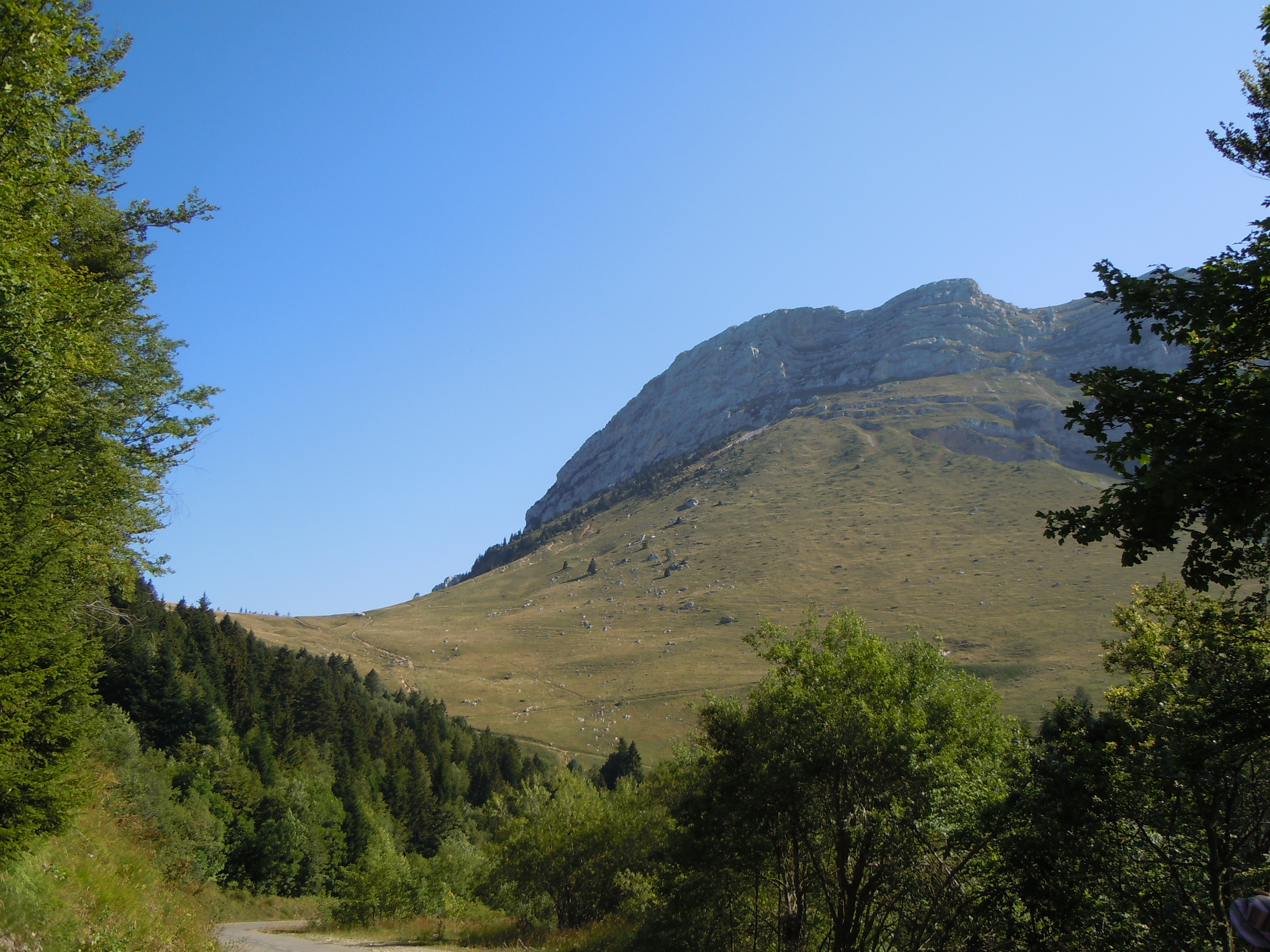 Col des Ayes et Dent de Crolles depuis le col du Coq - massif de la Chartreuse - France